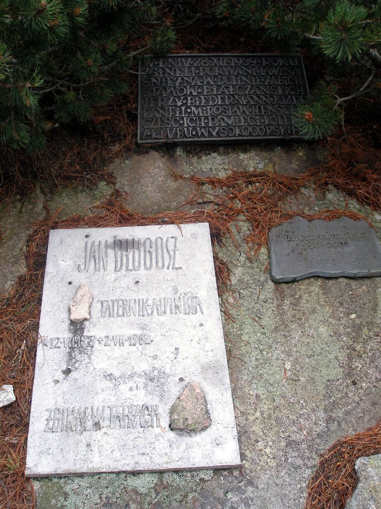 Tabule za kaplnkou na Symbolickom cintoríne pri Popradskom plese, Vysoké Tatry.